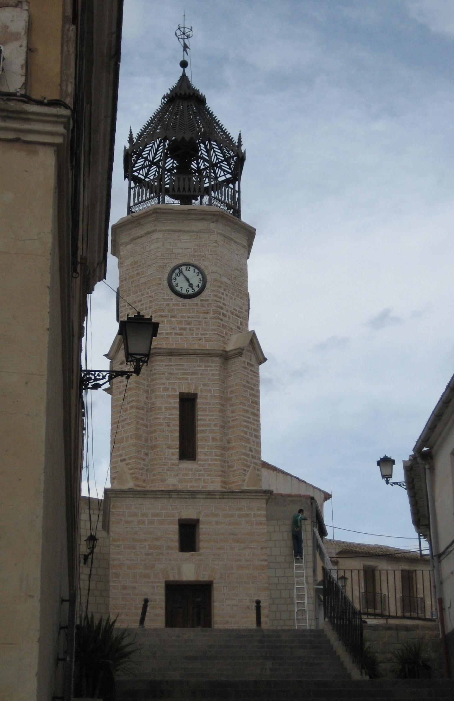 Vista de la Torre del Reloj, en la localidad de Pinoso (Alicante, España). Fotografía realizada por Rodriguillo el 24/03/2006.